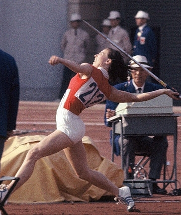 Elvīra Ozoliņa, 1964 Olympics